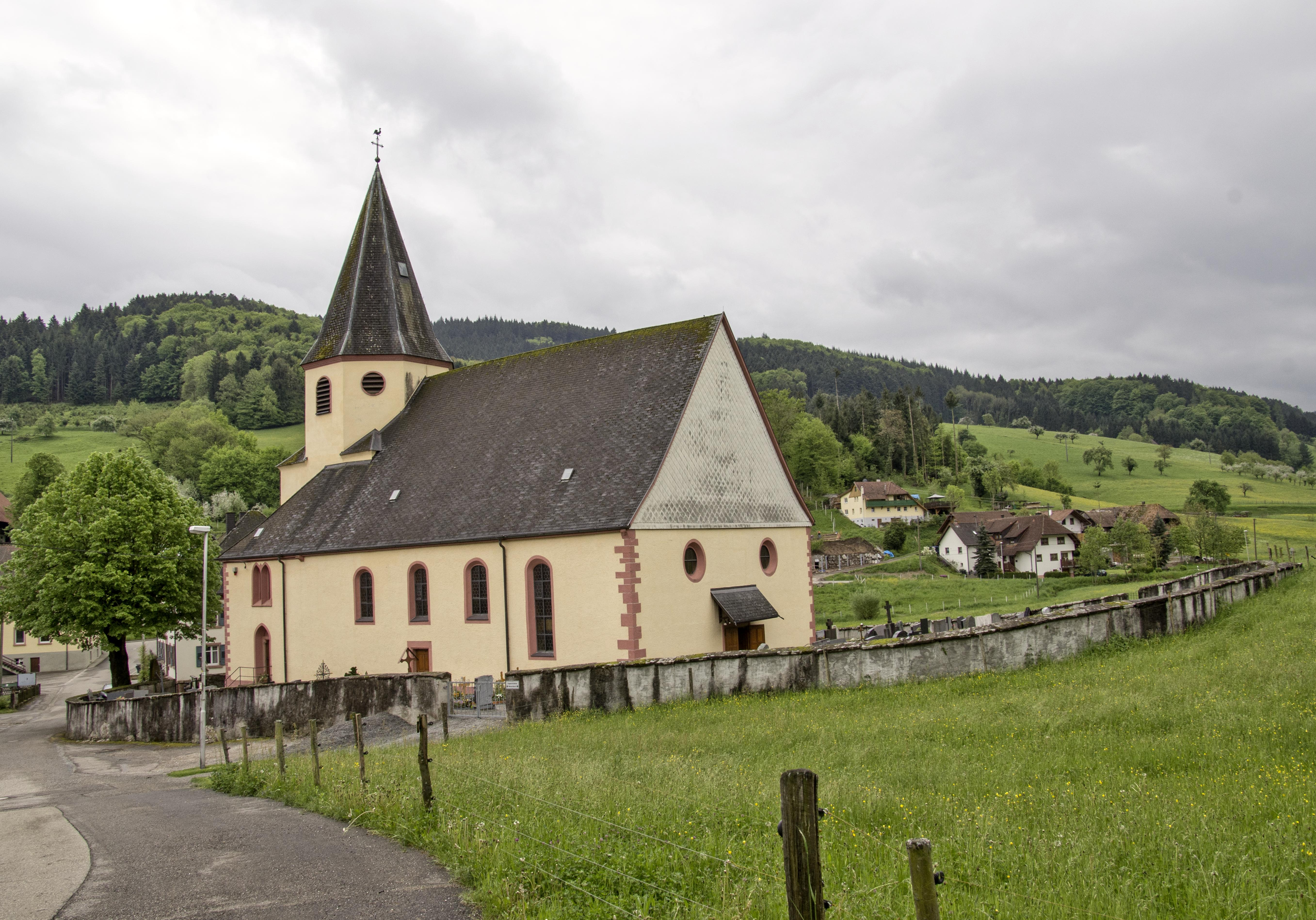 Bilder von der Pfarrkirche St. Mauritius in Prinzbach bei Biberach